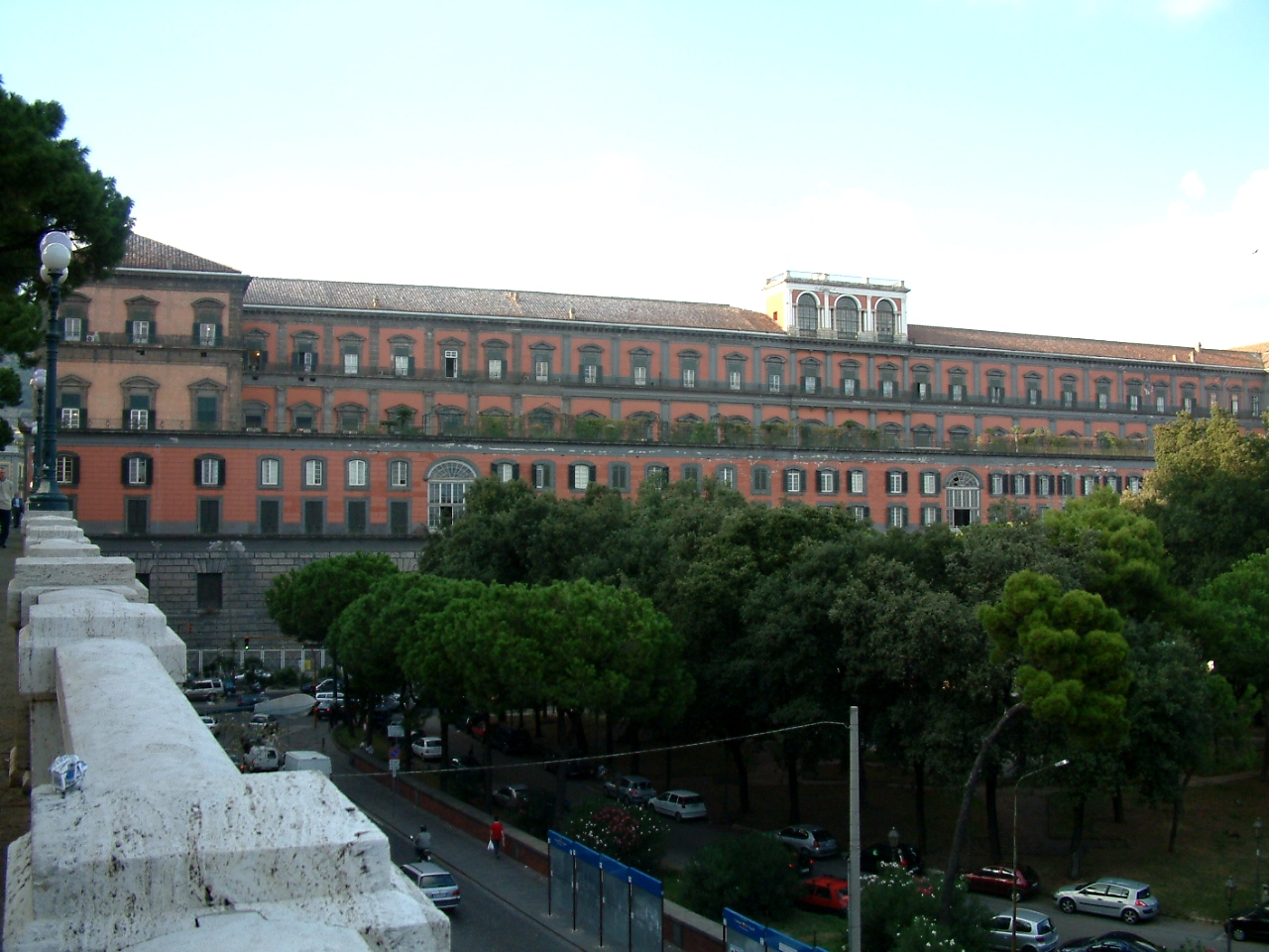 Il Palazzo Reale a Napoli, lato via Acton.